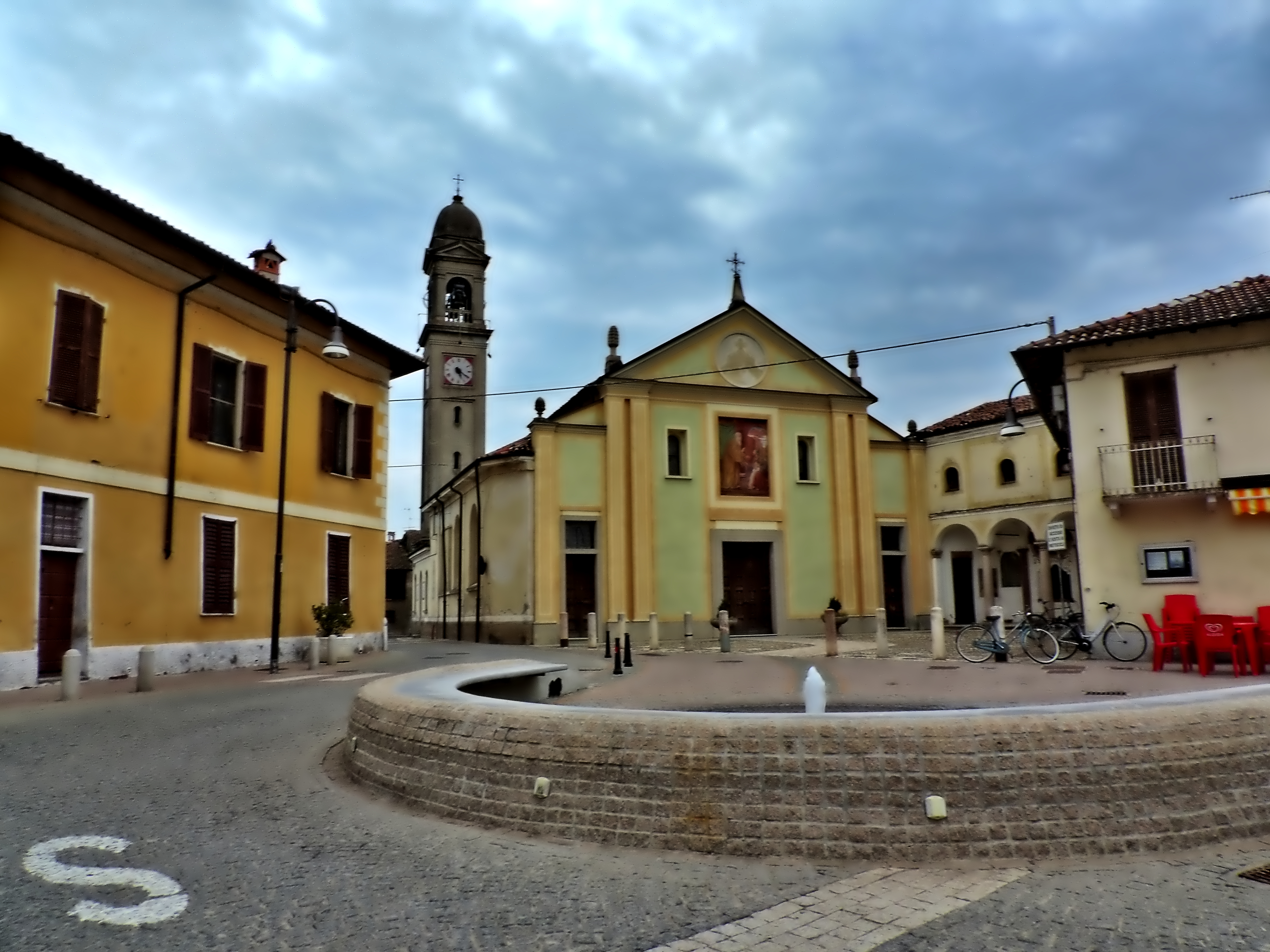 Trovo, provincia di Pavia: la piazza con la chiesa parrocchiale di San Biagio.